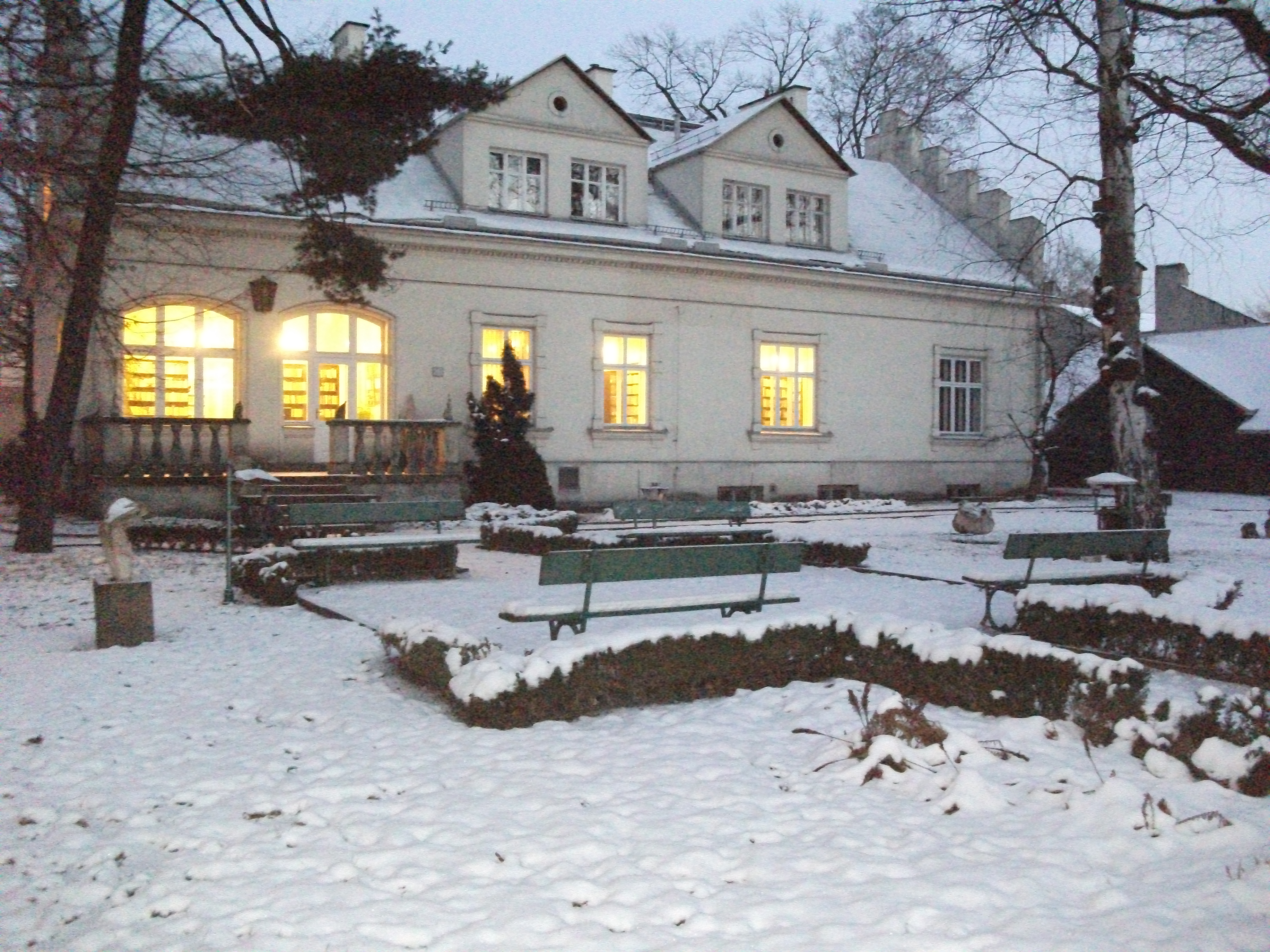 Willa przy ul. Powroźniczej 2 w Krakowie